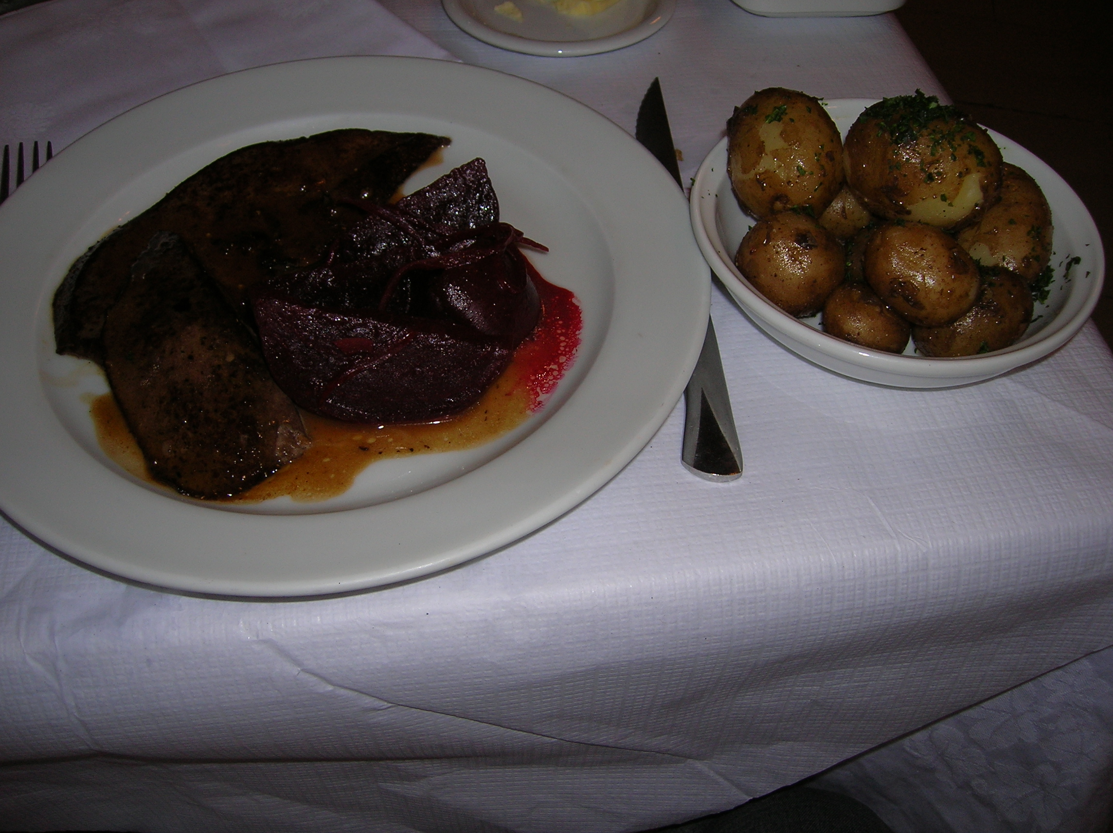 צבי מטוגן במחבת ברוטב של חמאה ושרי, ובצד תפוחי אדמה מורתחים עם חמאה ושומשום, במסעדת סנט ג'והן, לונדון